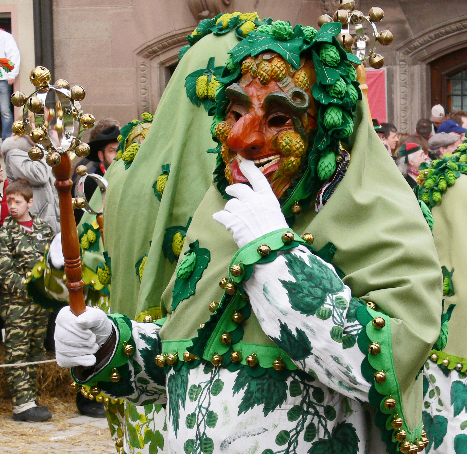 Narrenzunft Tettnang, Figur: Hopfennarr Veranstaltung: Narrensprung beim Narrentreffen Meßkirch 2006